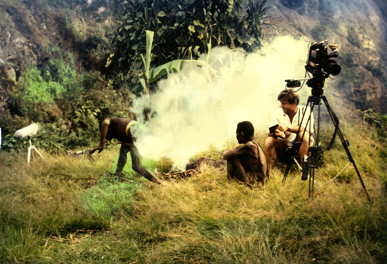 Die Feldaufnahme zeigt Eibl-Eibesfeldt bei den Eipo im Jahr 1978